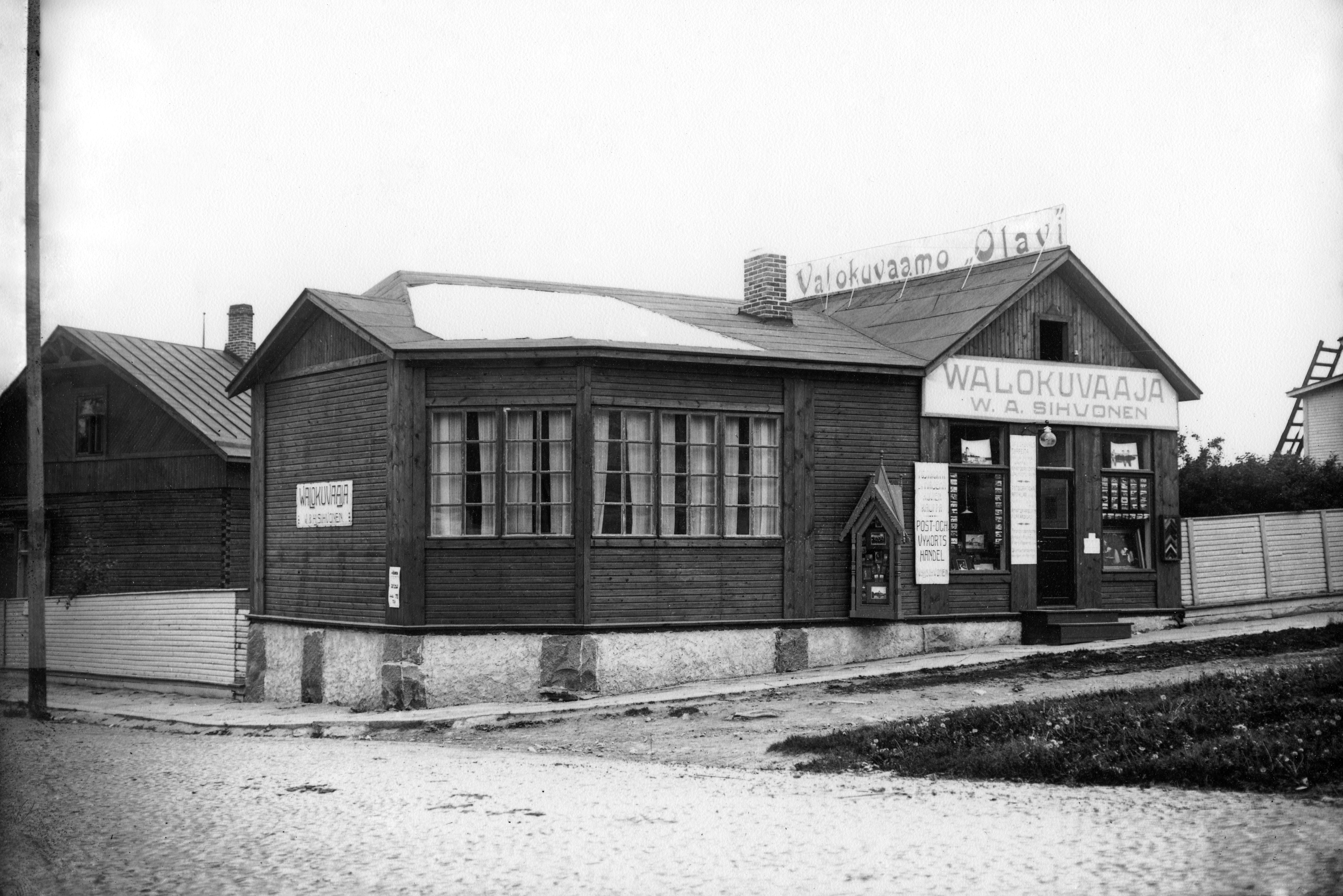 Valokuvaamo Olavi, Olavintori, Koulukatu, Savonlinna. Sihvosen valokuvaamo "Olavi" Olavintorin etelälaidassa (Olavinkatu 26). Tumma, vaakalaudoitettu, yksikerroksinen, harjakattoinen rakennus, toisessa päässä poikkiharja. Seinissä ja katoilla suuria mainostekstejä "Valokuvaamo Olavi", "Walokuvaaja W. A. Sihvonen".